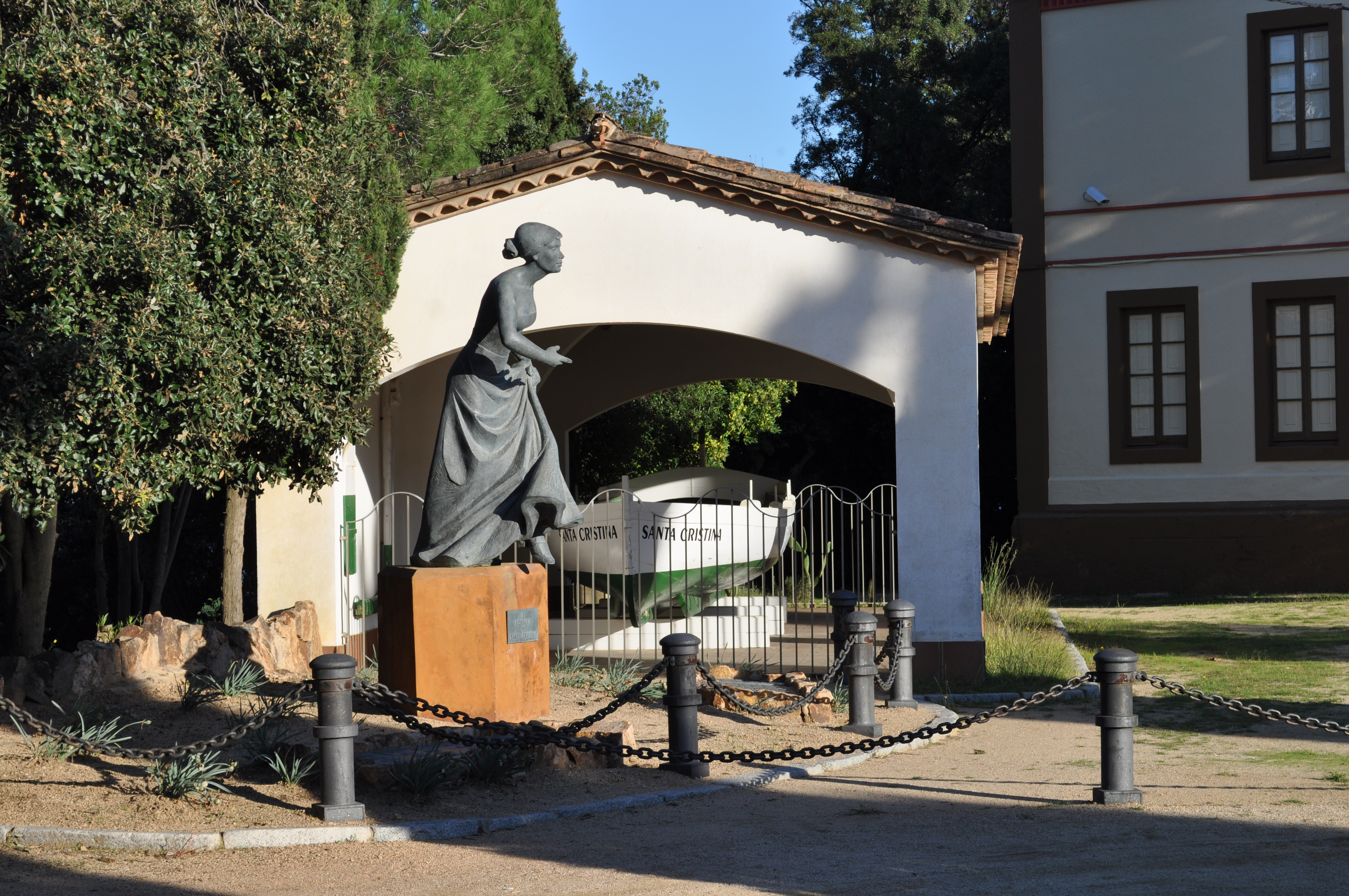 Lloret, Ermita de Santa Cristina, Bootshalle und Denkmal